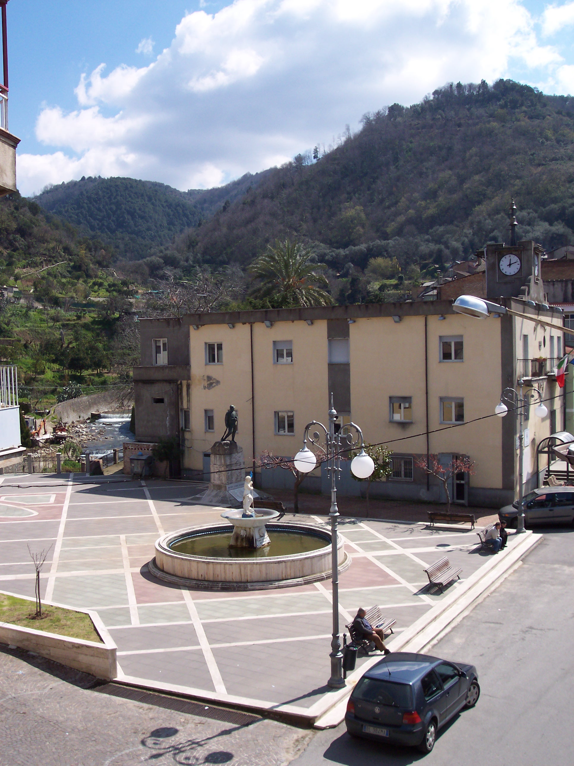 La piazza principale di Acquaro (piazza Matteotti). Sono visibili la fontana del Nettuno appena restaurata e, sullo sfondo, il torrente Amello, il quale sfocia nel fiume Mésima.